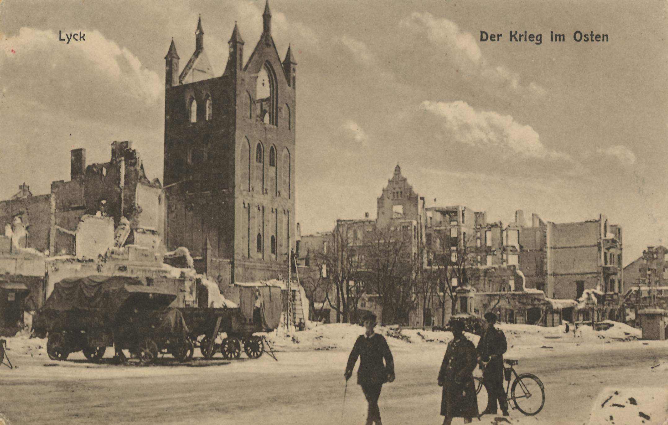 Ruinen